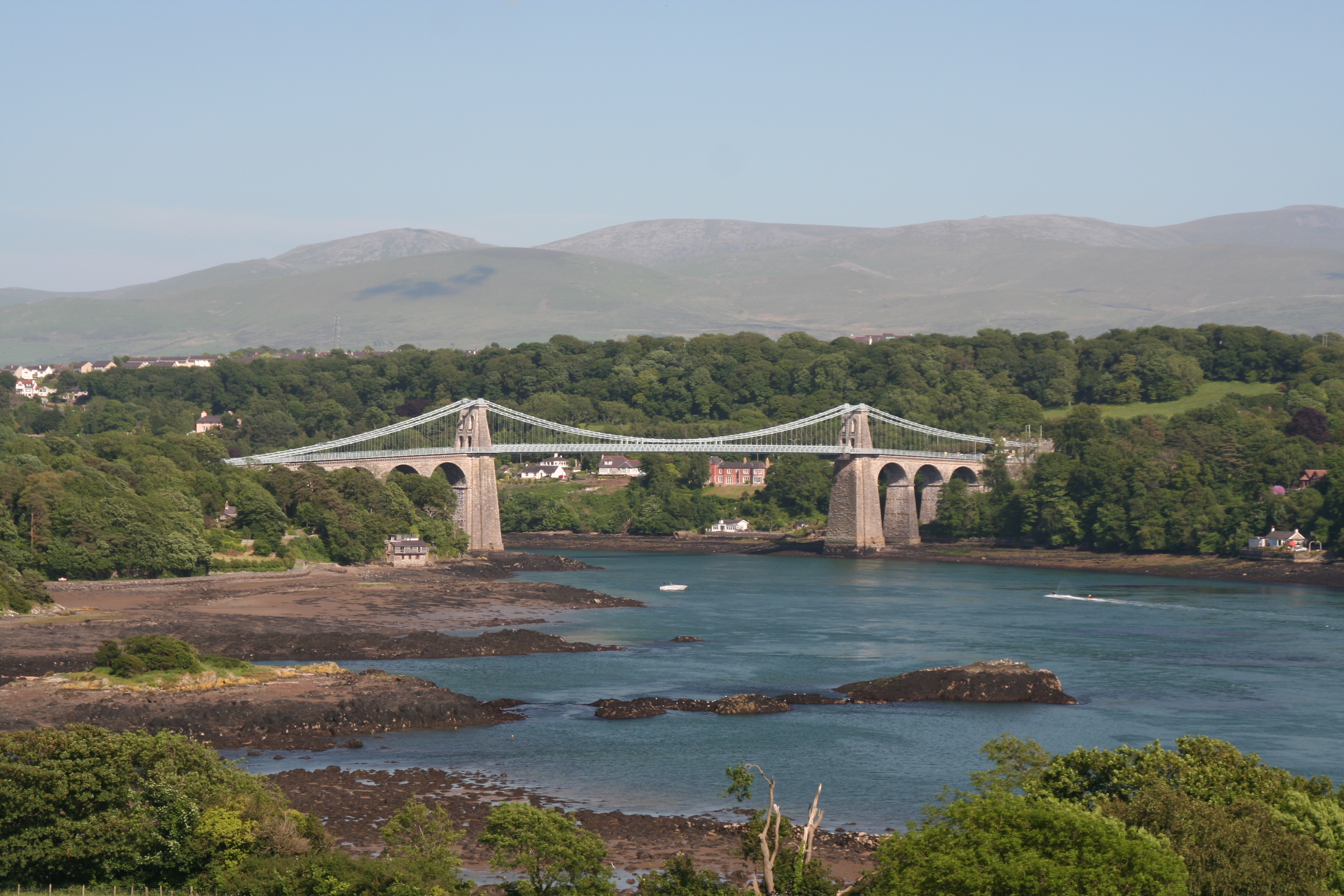 Menai Bridge